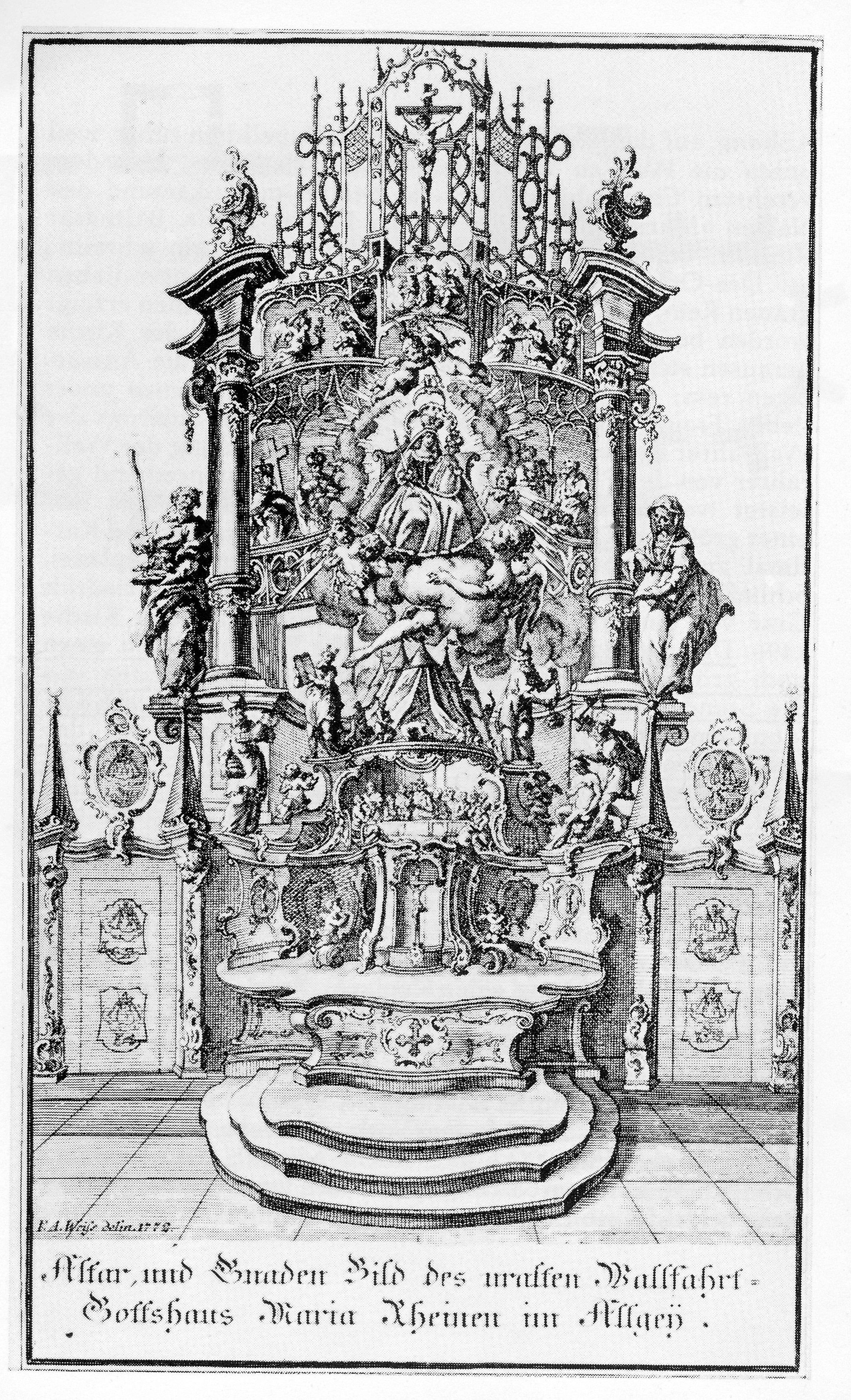 Altes Andachtsbild von 1772